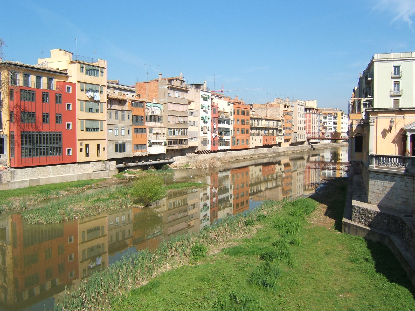 Des del Pont de Pedra